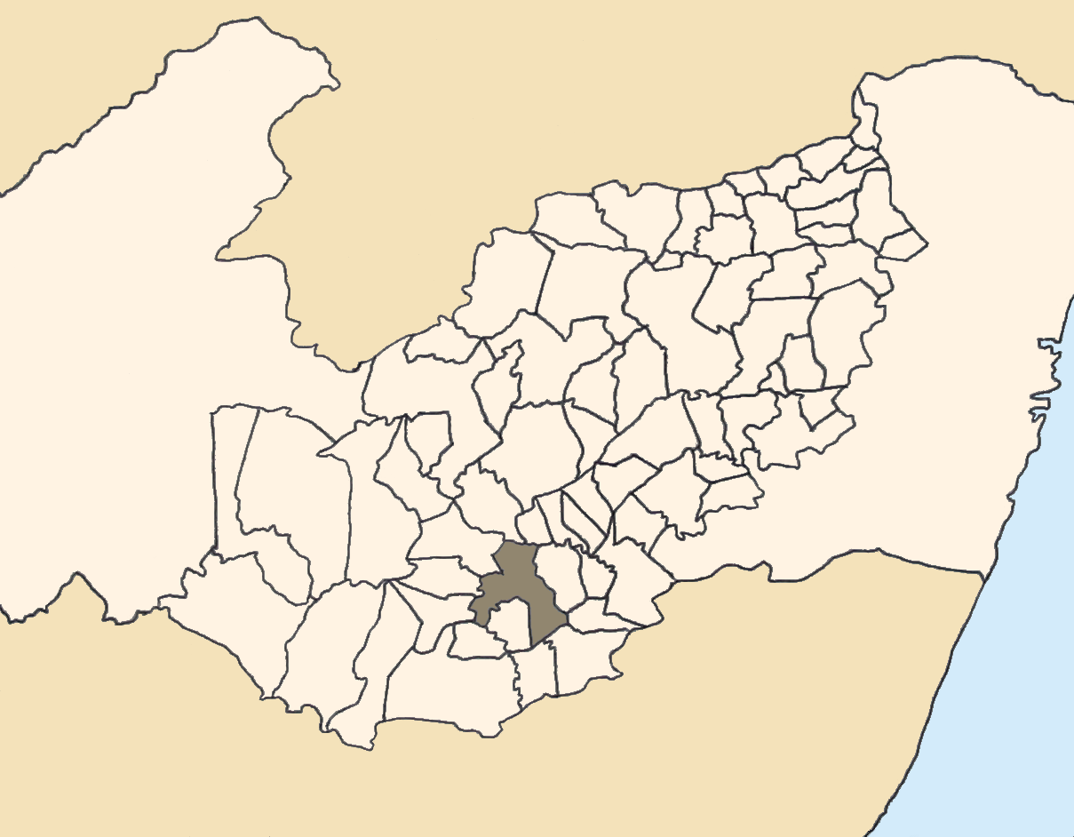 Mapa da mesorregião Agreste de Pernambuco (Brasil) subdivida em municípios. Em destaque, o município de Garanhuns. Map of the brazilian state of Pernambuco (mesorregião Agreste) showing the city of Garanhuns. Imagem tratada com o GIMP. Image made with GIMP.